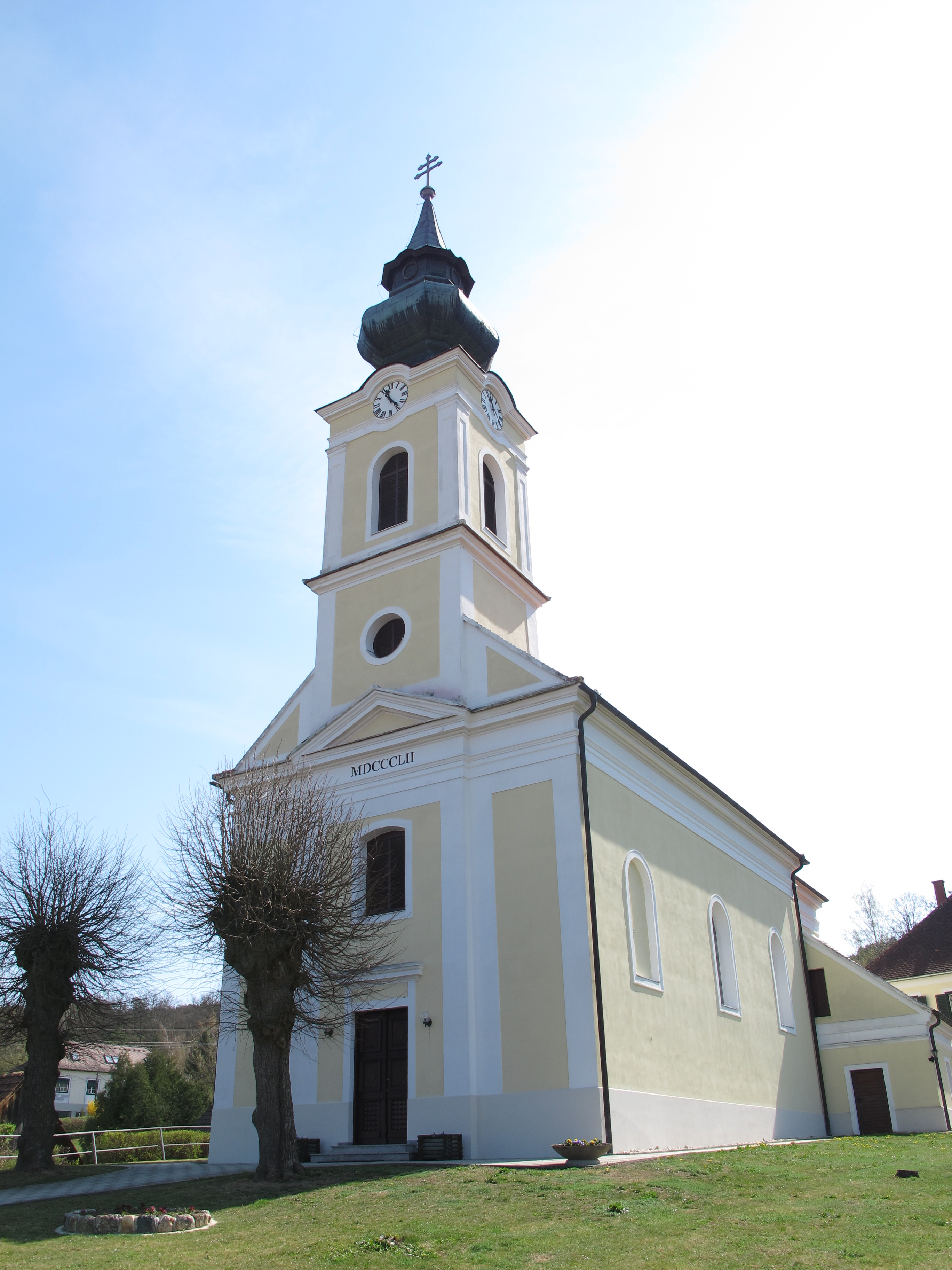 Kirche Badersdorf